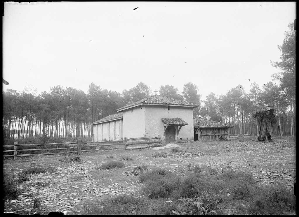 Reproduction numérique de l'œuvre Chapelle Saint-Pierre, réalisée par Félix Arnaudin à Mézos le 31 janvier 1906 selon la technique du gélatino bromure d'argent sur plaque de verre (13 x 18 cm)